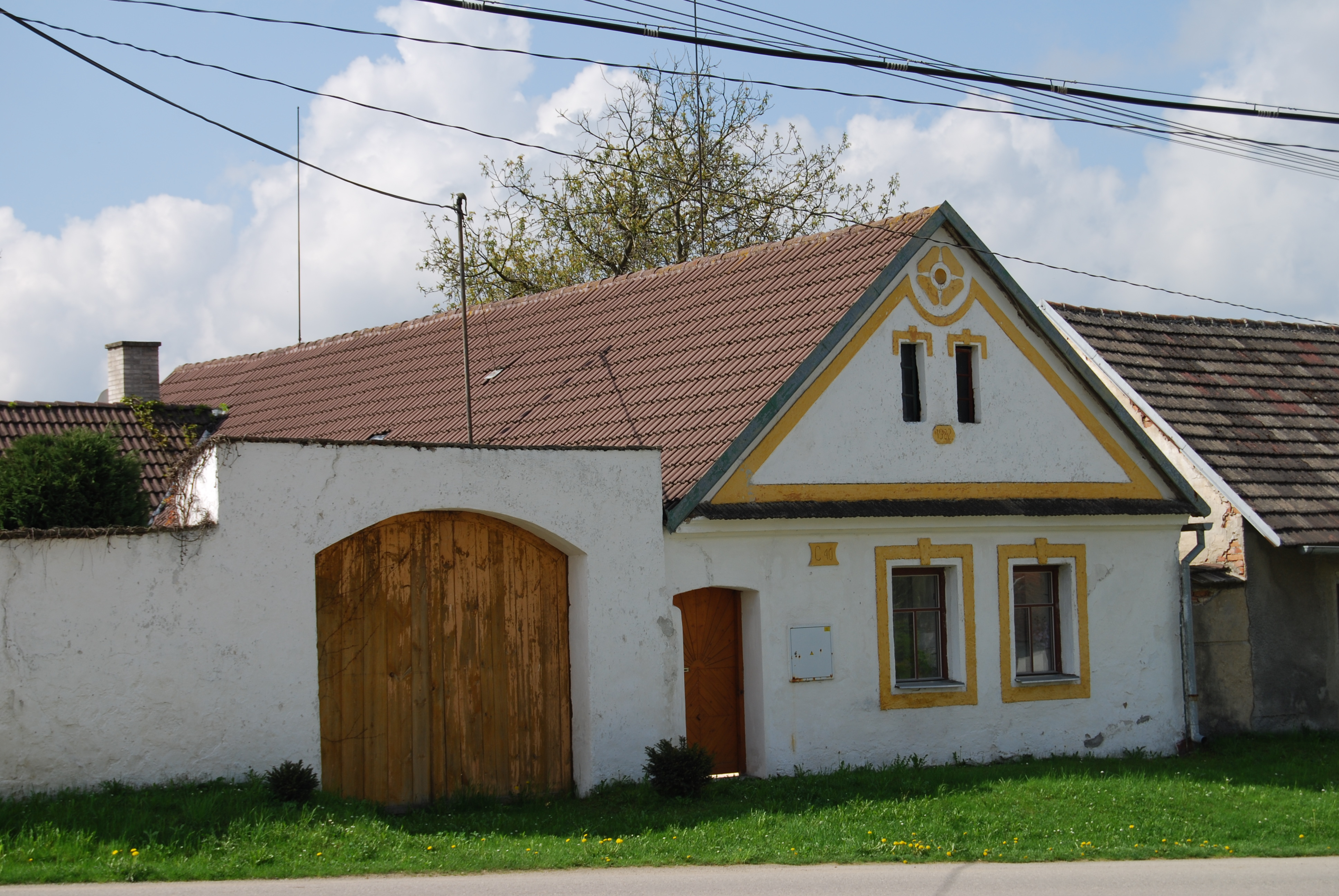 Usedlost ve vesnici. Podboří je vesnice, část obce Opařany v okrese Tábor. Česká republika.